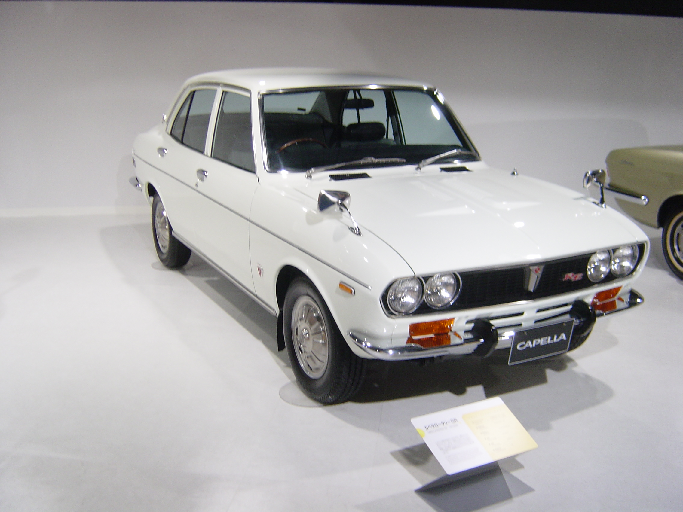 Mazda capella(マツダ・カペラ),Mazda Museum